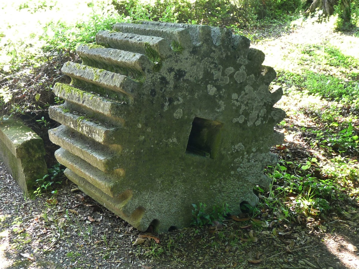 Papeterie de l'Escalier, La Couronne (Charente, France). Broyeuse à pâte à papier